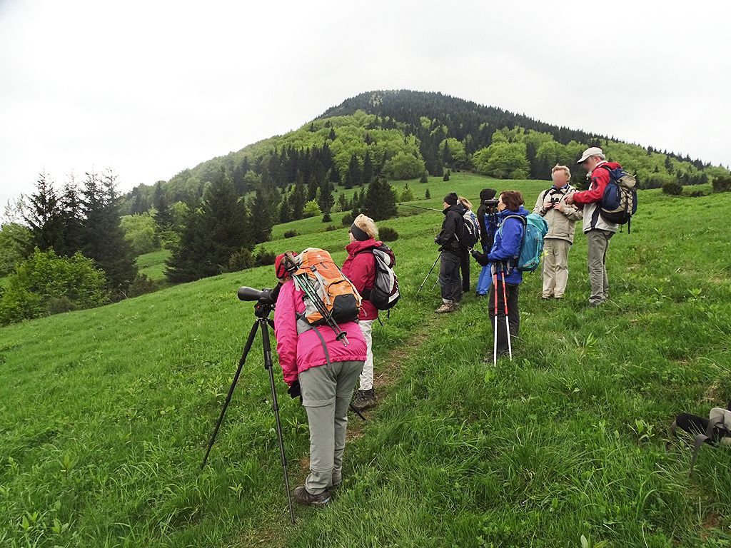 Gruppenreise 2015: Bärensafari mit Reiseführer Vlado Trulik (Biologe) in der Mala Fatra (Slowakei).